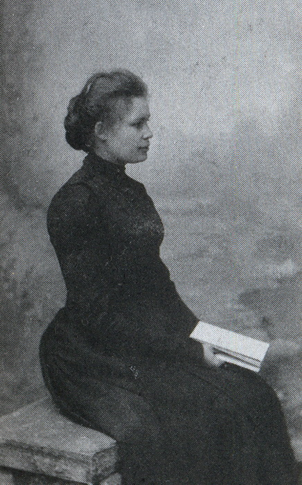 Беларуская (тарашкевіца): Алаіза Пашкевіч